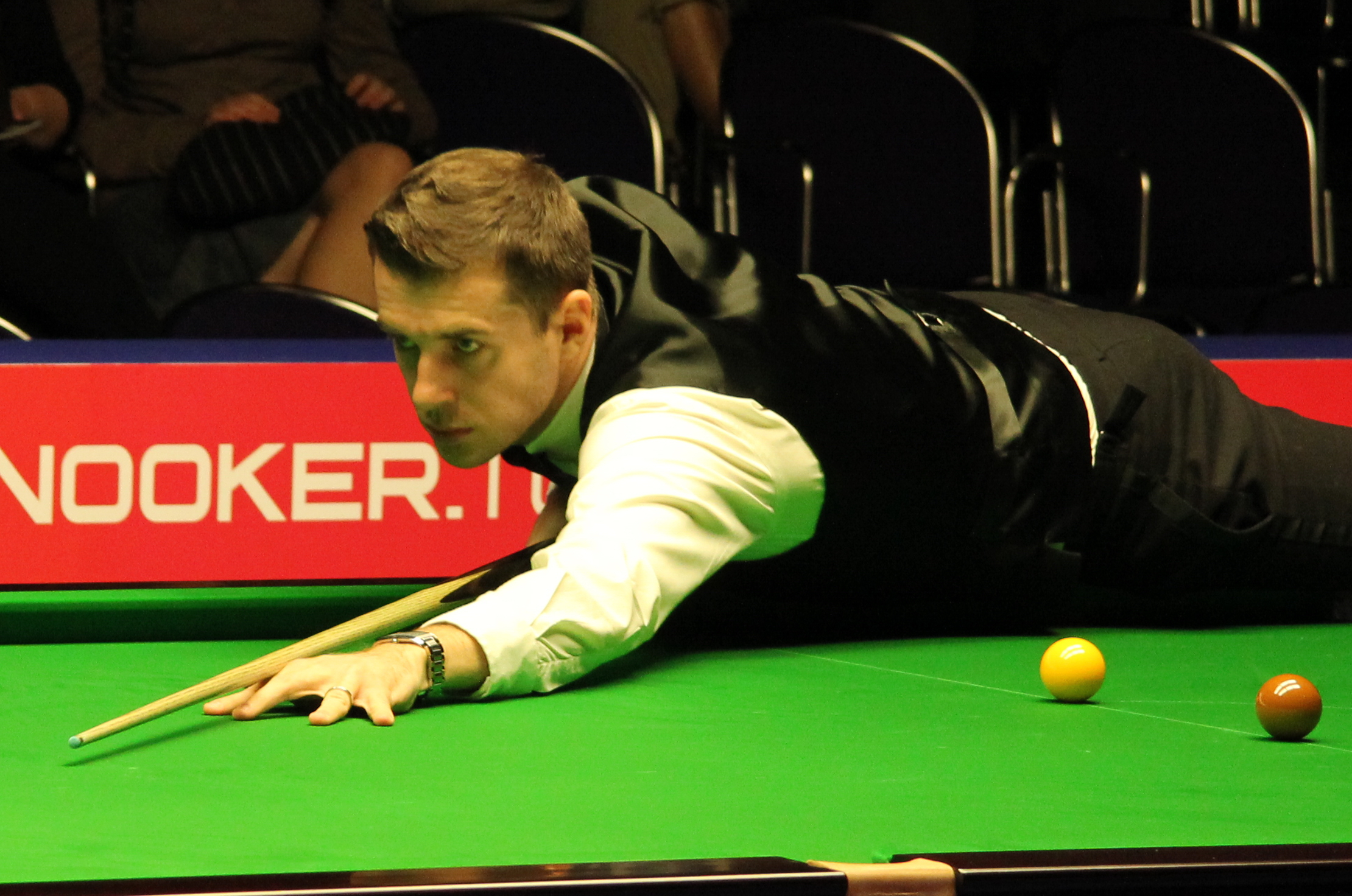 Mark Selby beim Paul Hunter Classic 2011